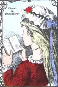 Devinette, France before 1900